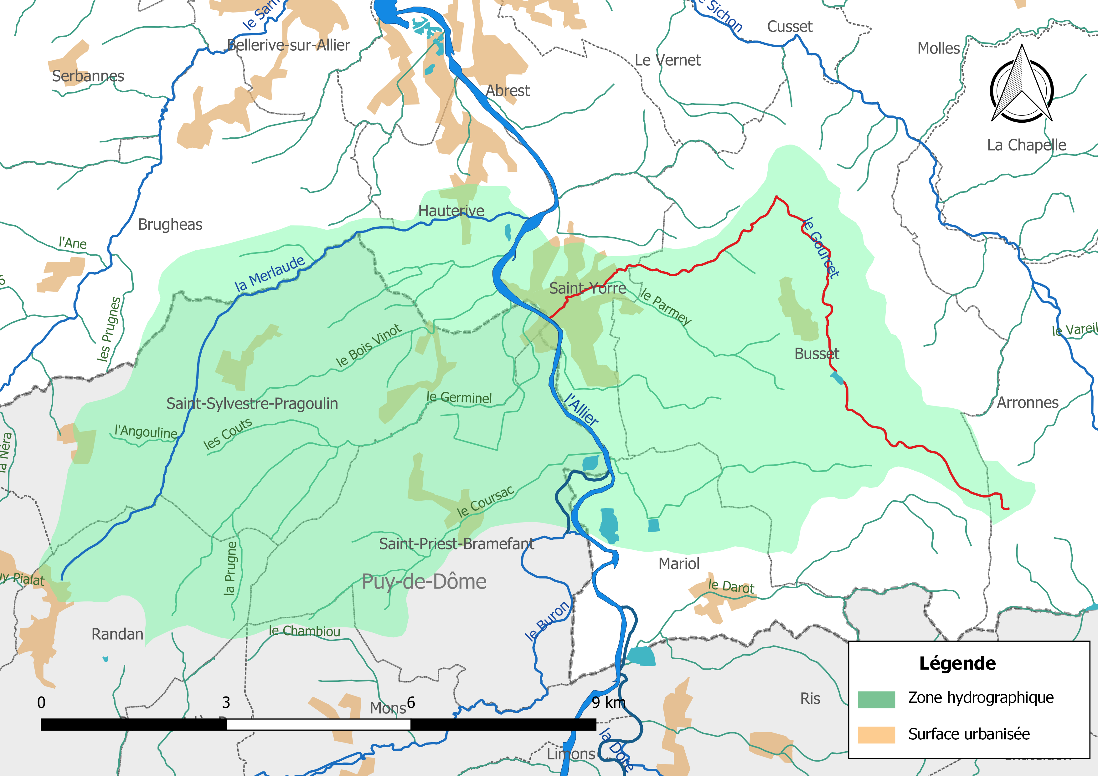 Carte du cours d'eau « le Gourcet » (France) et de la zone hydrographique dans laquelle il s'insère.